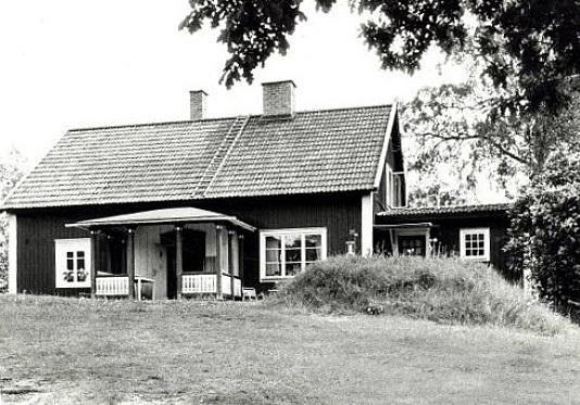 Bostadshus tillhörande Sadelmakartorp